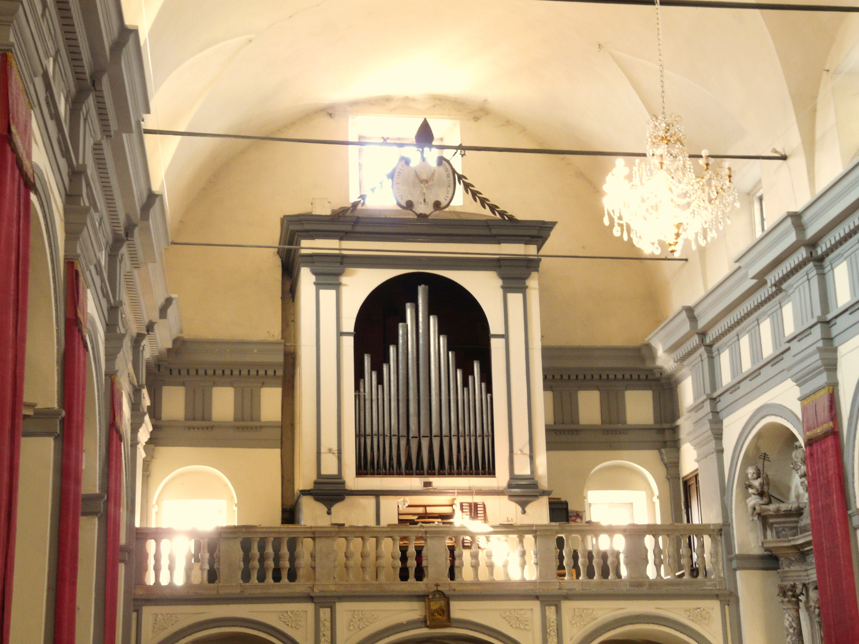 Chiesa-Santuario di San Remigio, Fosdinovo, Toscana, Italia